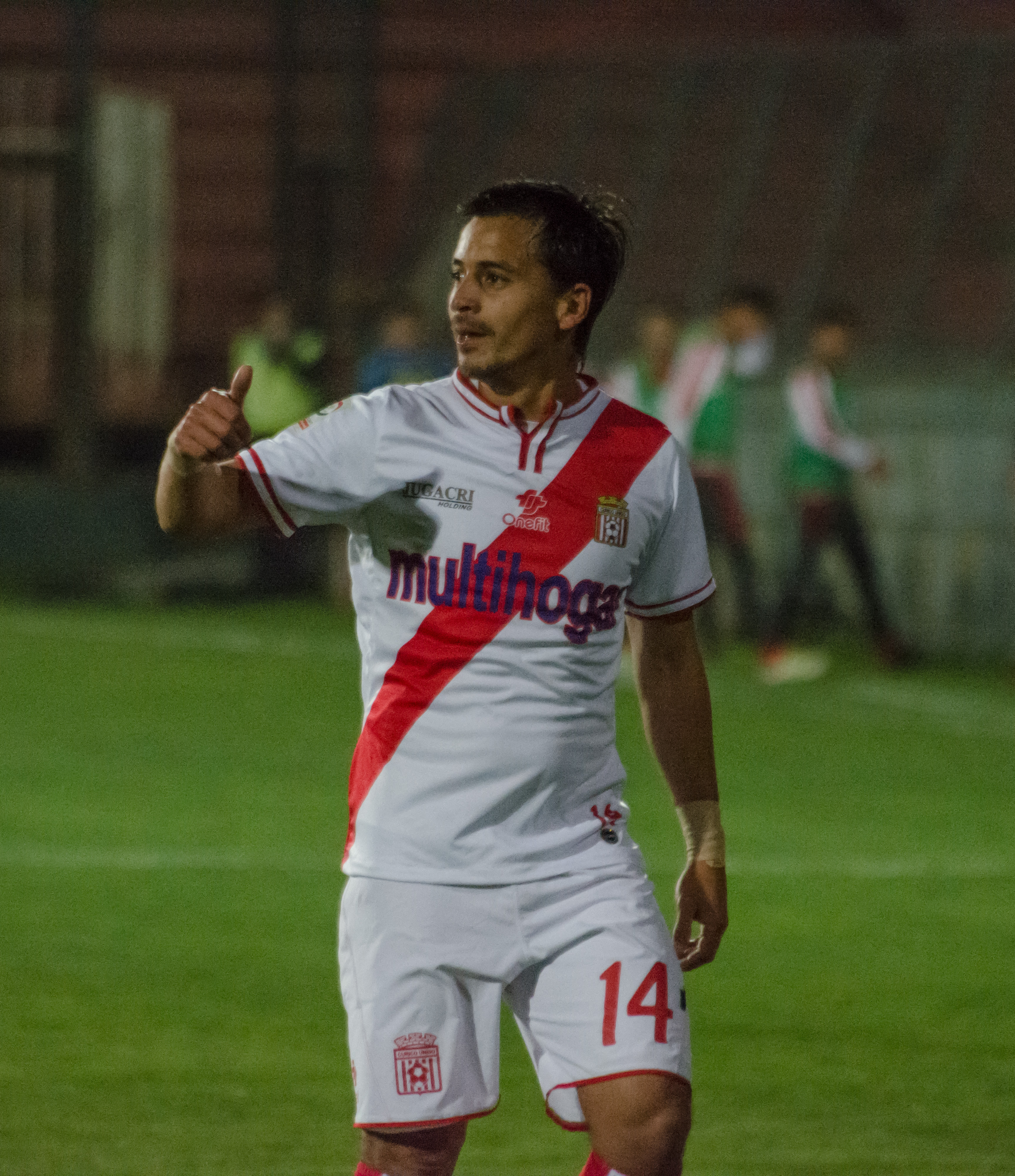 Carlos Espinosa, Unión Española v Curicó Unido, Estadio Santa Laura, Independencia, Santiago, Chile